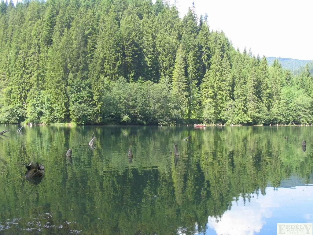 Gyilkos-tó